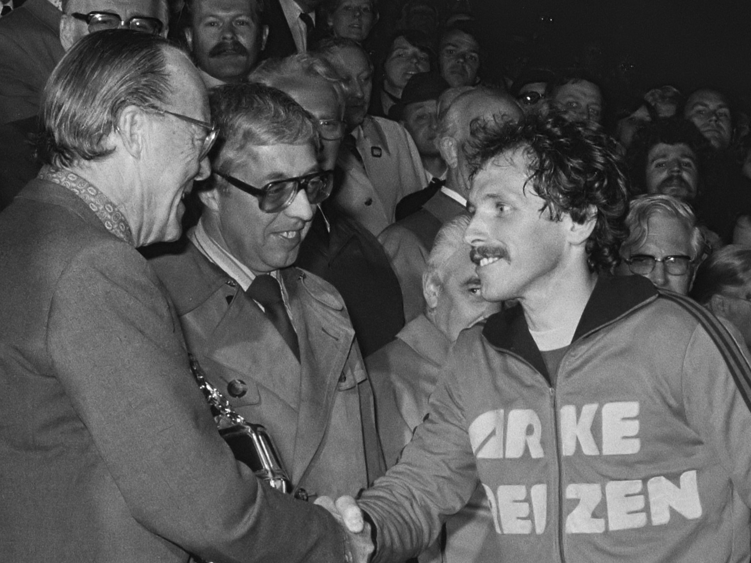 Bekerfinale Twente tegen PEC 3-0; Epi Drost, prins Bernhard en Hogewoning met Cup 19 mei 1977